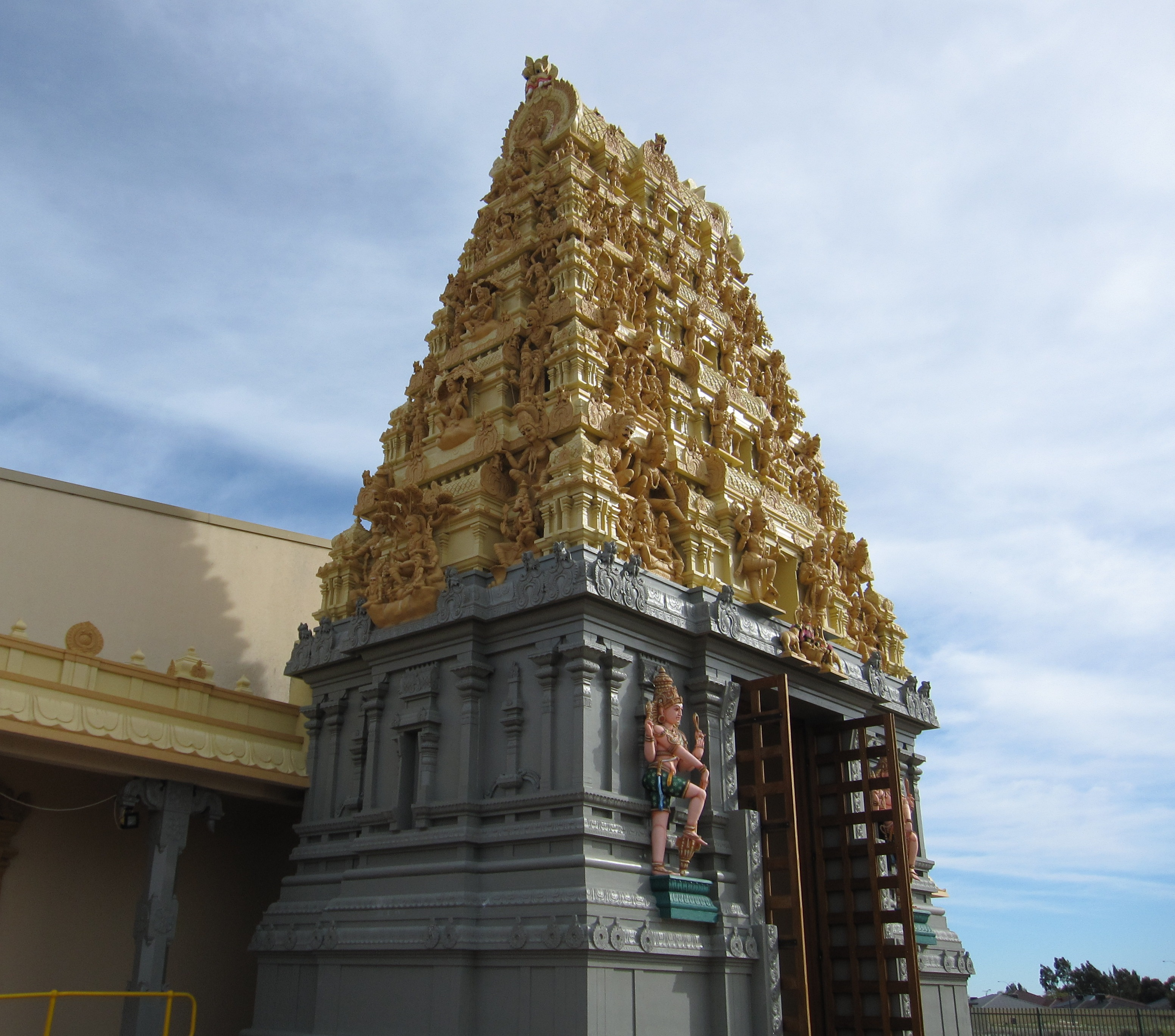 பேர்த் சிவன் கோயில்